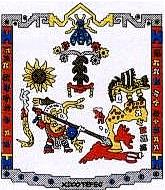 Este es el escudo original de Xicotepec